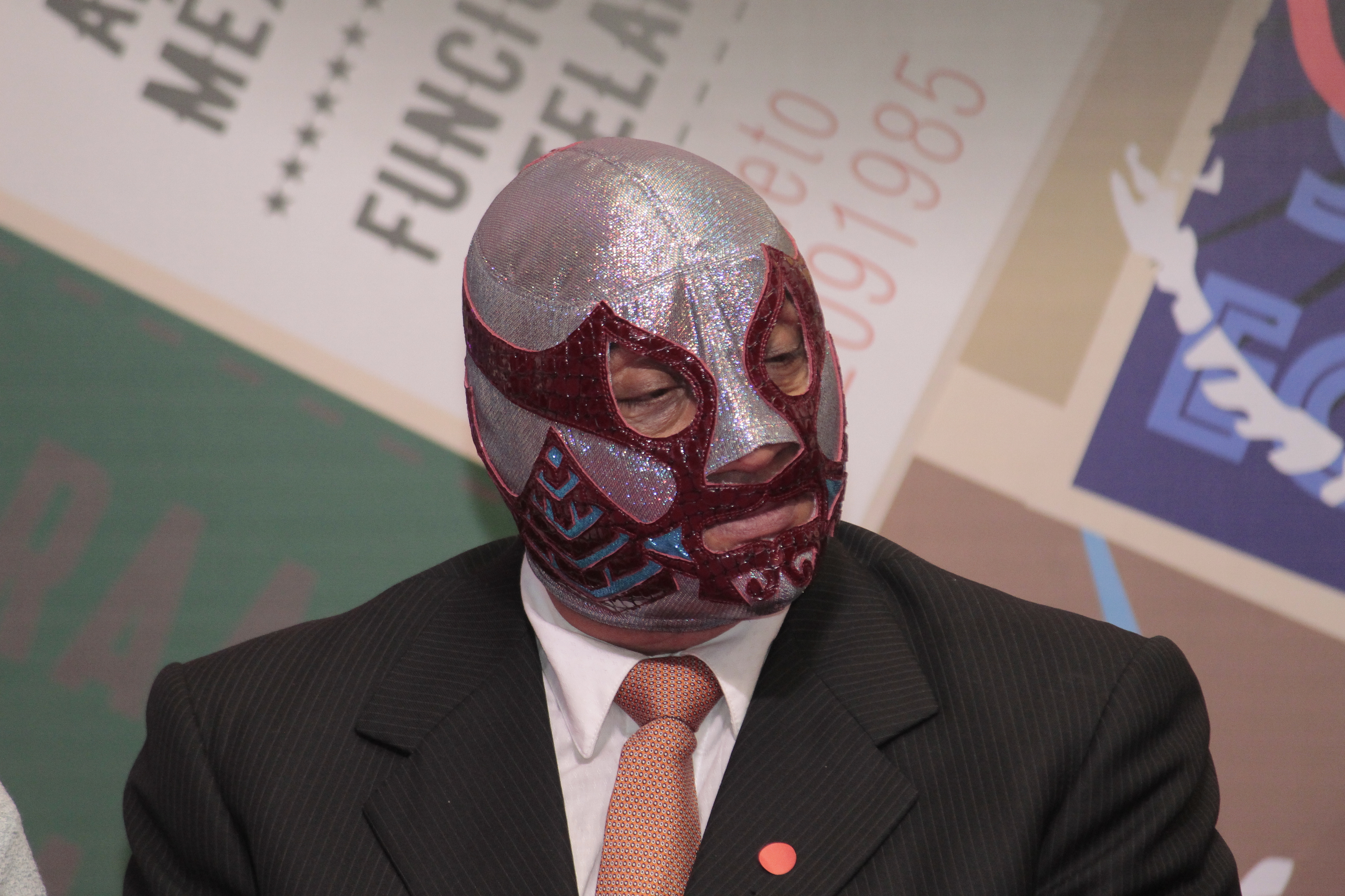 Le catcheur mexicain El Canek en juillet 2018.